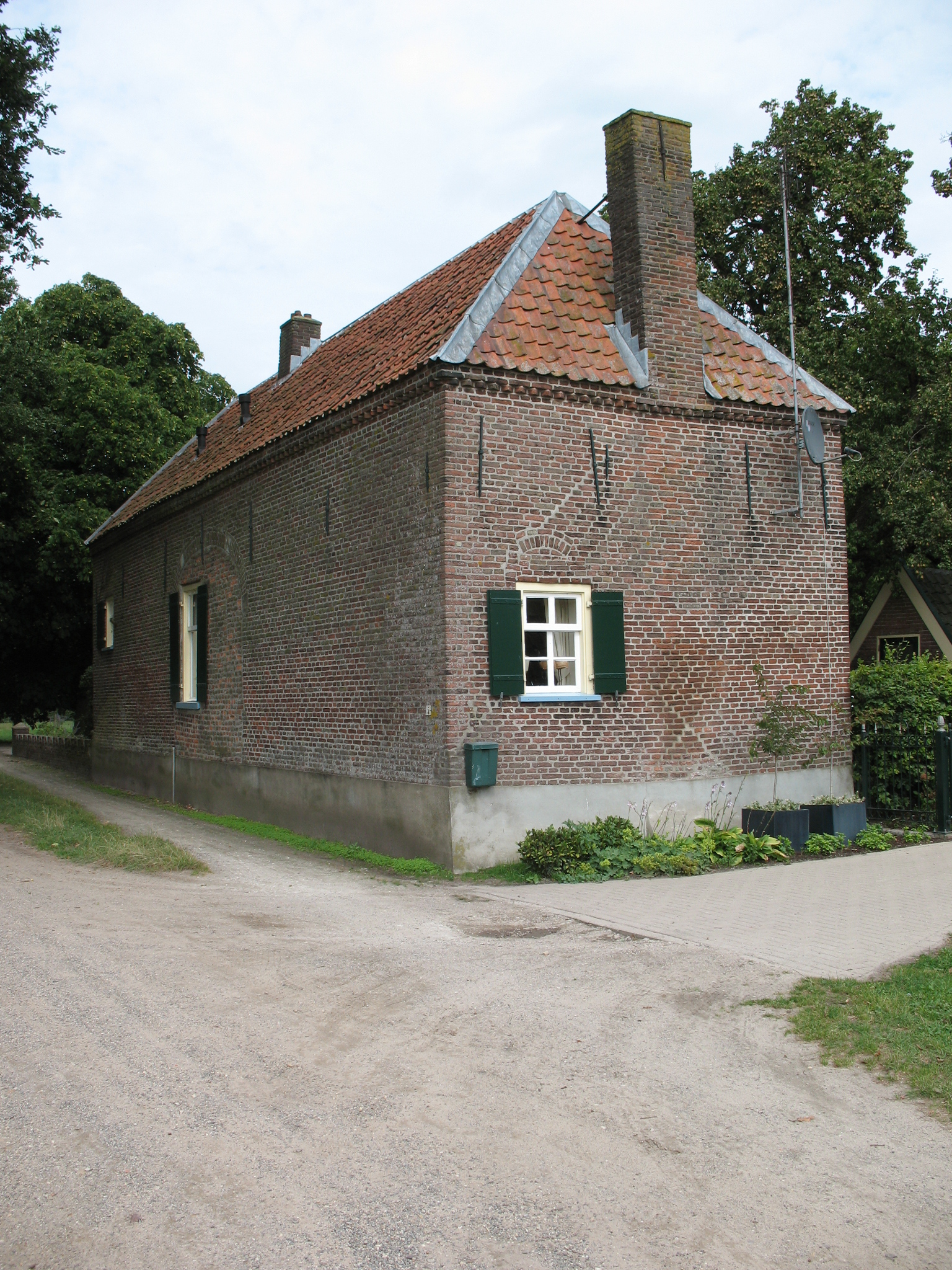 Poortgebouw Kasteel Harsselo - Rijksmonument in Bennekom